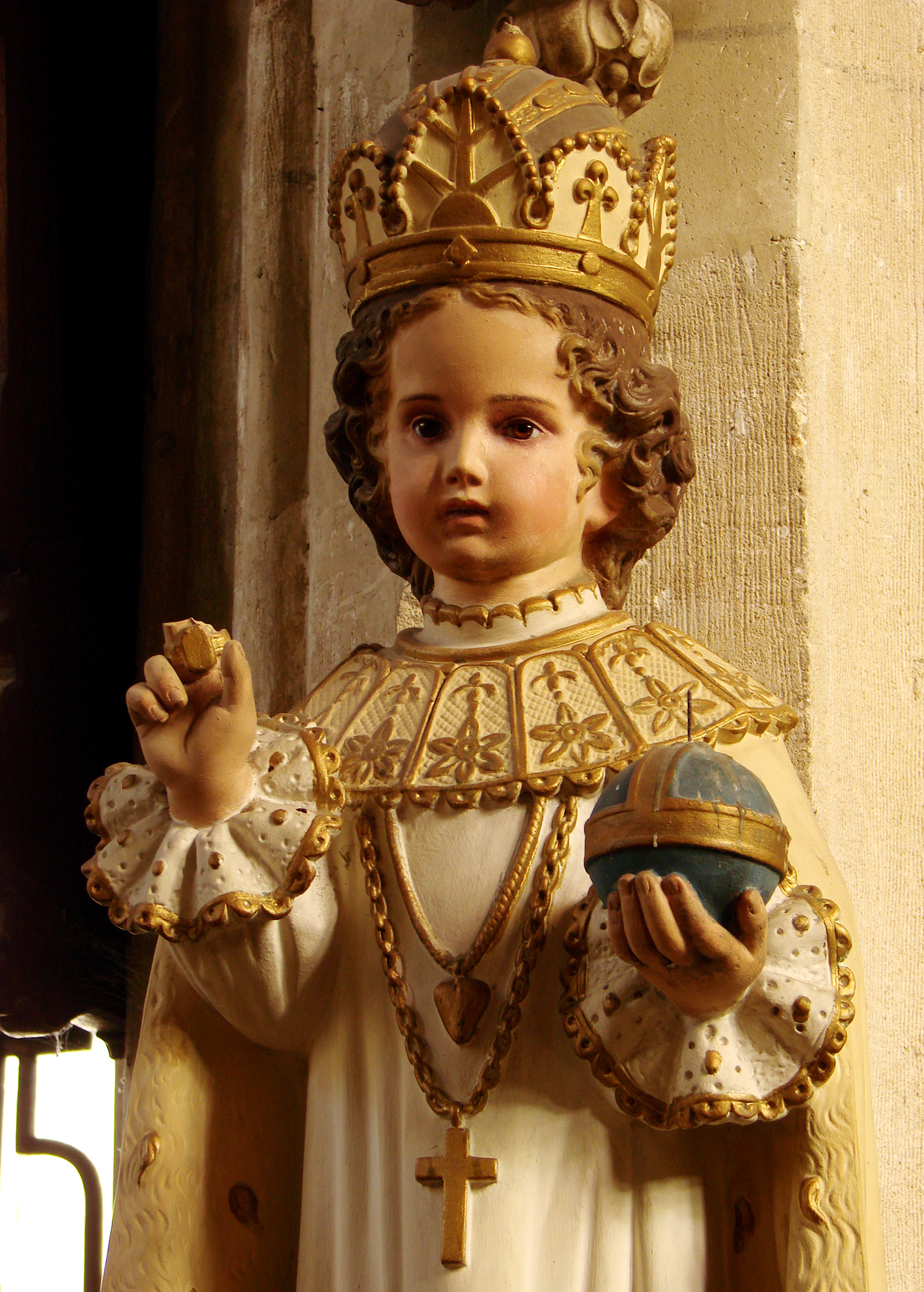 Statue représentant l'Enfant Jésus de Prague, dans l'église Notre-Dame de Joinville, Haute-Marne, détail. Remarquer les yeux en verre.